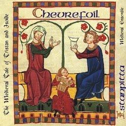 Chevrefoil